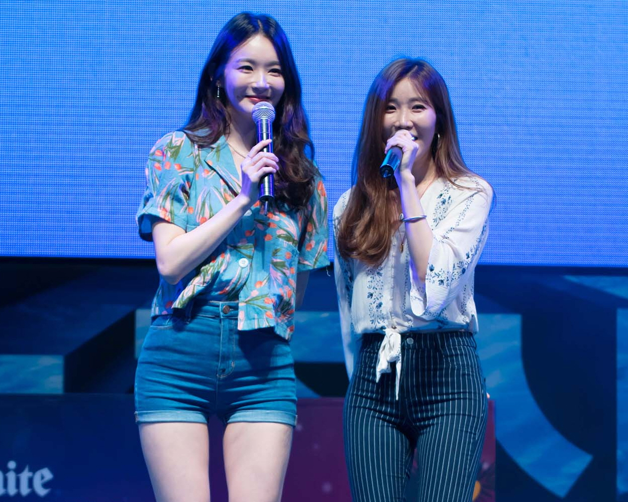 17.07.29 오션월드 놀존심콘서트 - 다비치 직찍